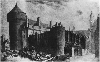 Lavis d'après un dessin de Despré, début du XIX° siècle (Bibliothèque Municipale de Tours), représentant le château de Tours tel qu'il apparaît après la construction du pavillon de Mars au XVIII° siècle, la partie Ouest en ruines